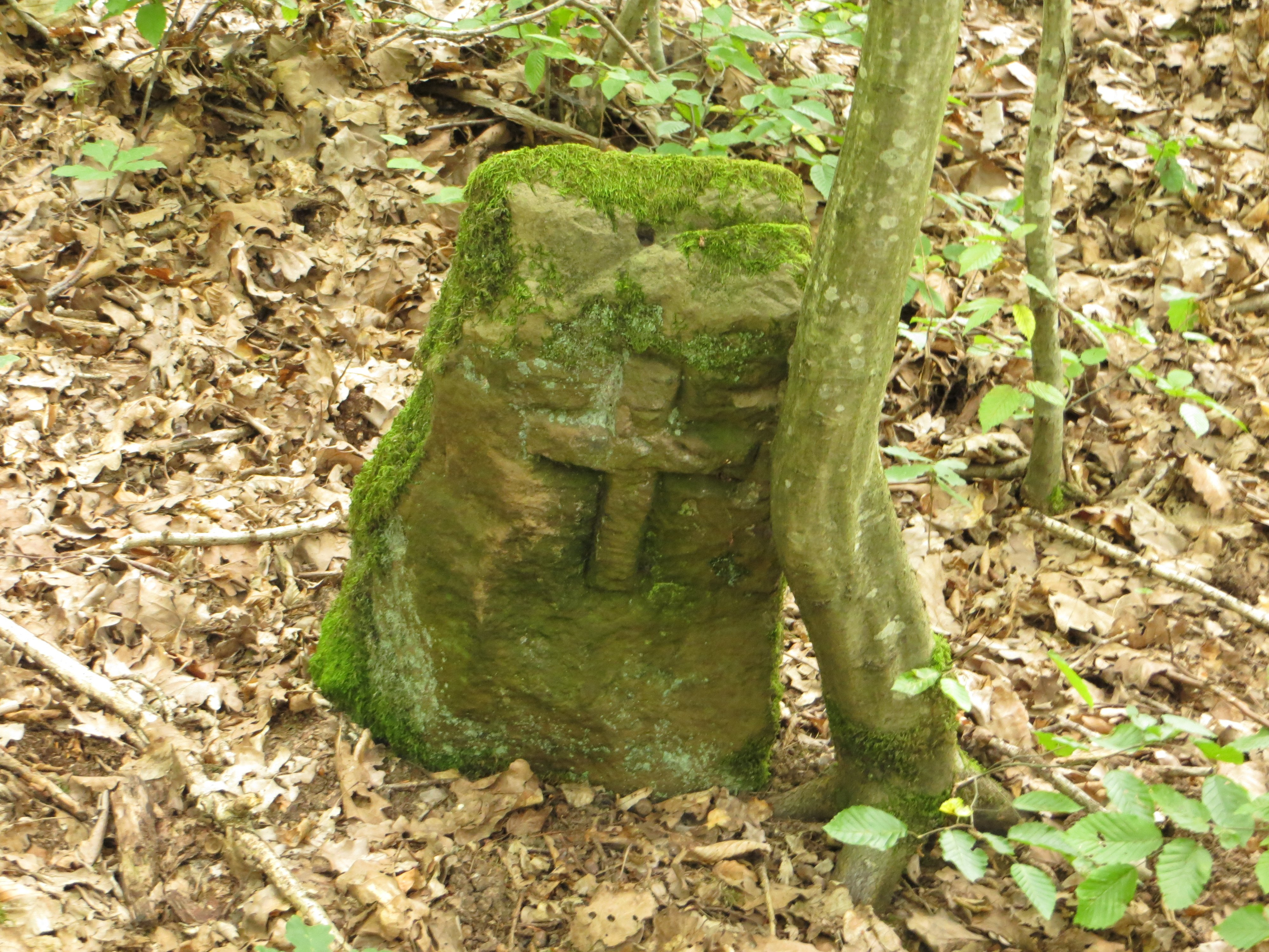 Sontheimer Grenzstein Nr. 26 mit Heilbronn, Sontheimer Seite